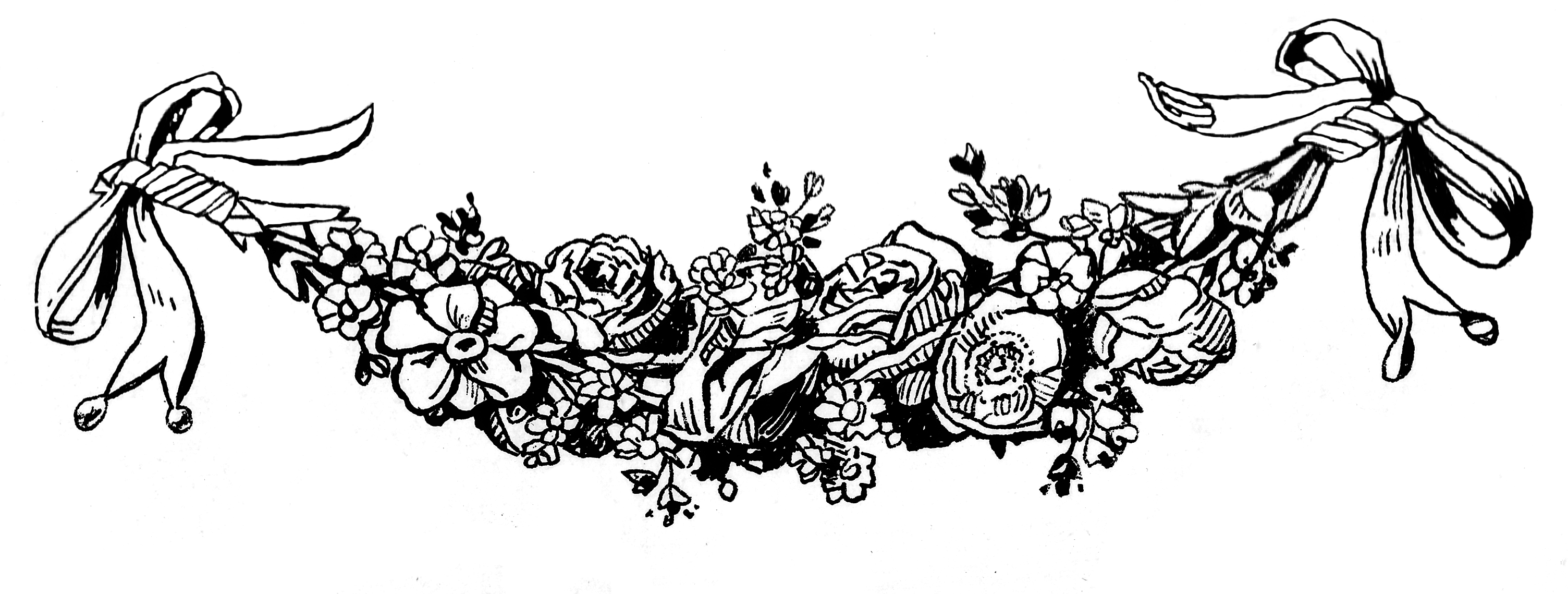 Festoon